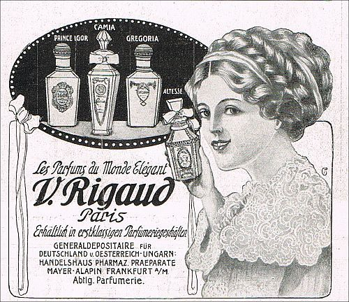 Publicité pour les Parfums Rigaud (Paris) : Prince Igor, Camia, Gregoria et Altesse, dans un magazine allemand (1910).